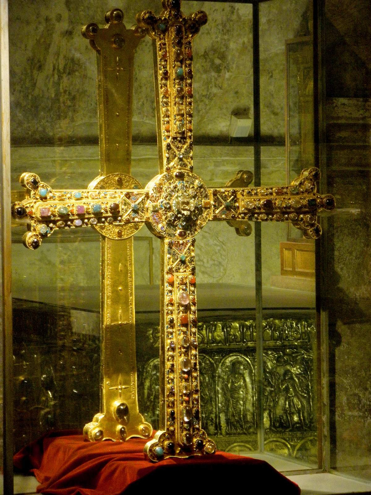 Cruz de la Victoria, conservada en el interior de la Cámara Santa de Oviedo.